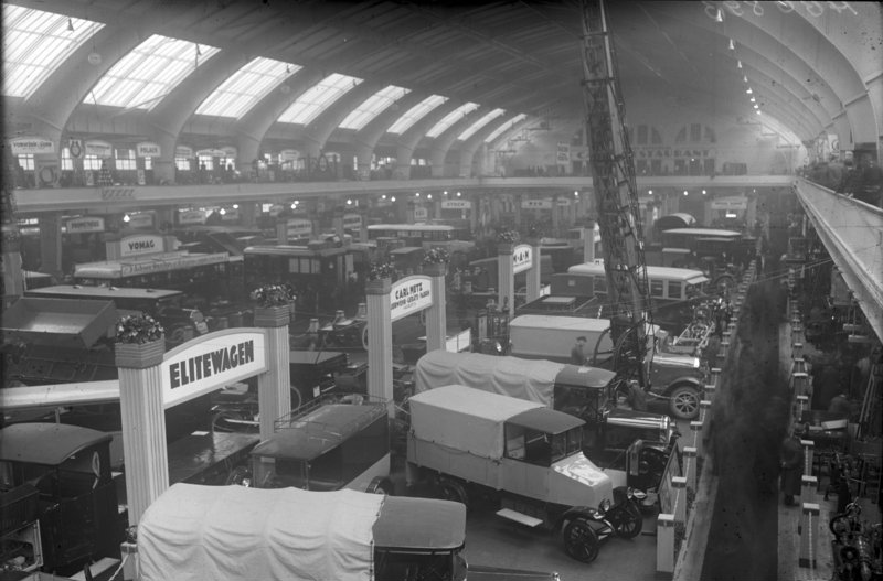 Zur Eröffnung der großen Berliner Automobil-Ausstellung am Kaiserdamm. Blick in die neueröffnete Automobilhalle mit ihren Motorrädern und Lastkraftwagen, wo sie ein wunderbares Bild Deutscher Technik darstellen.